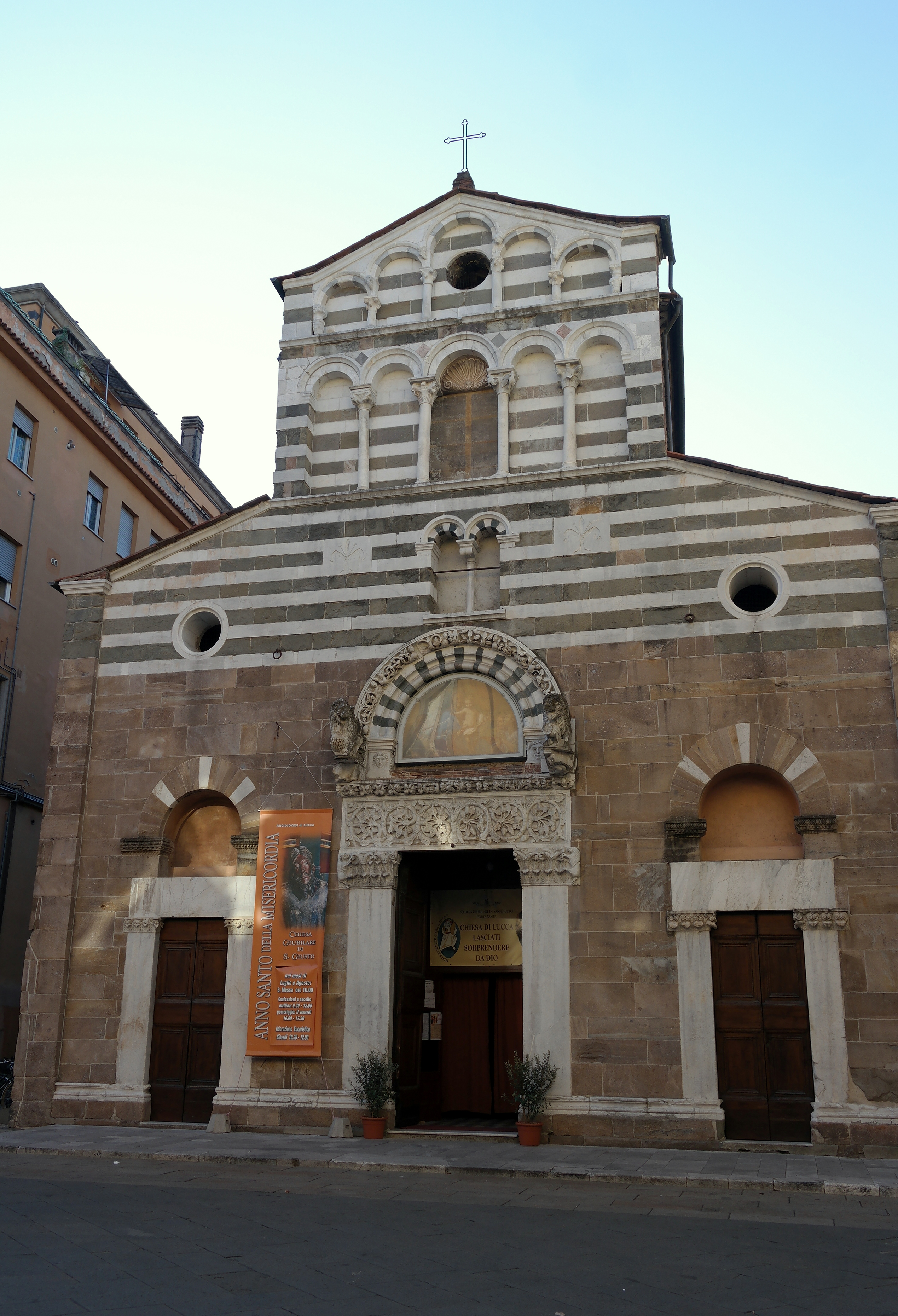 Chiesa di San Giusto a Lucca